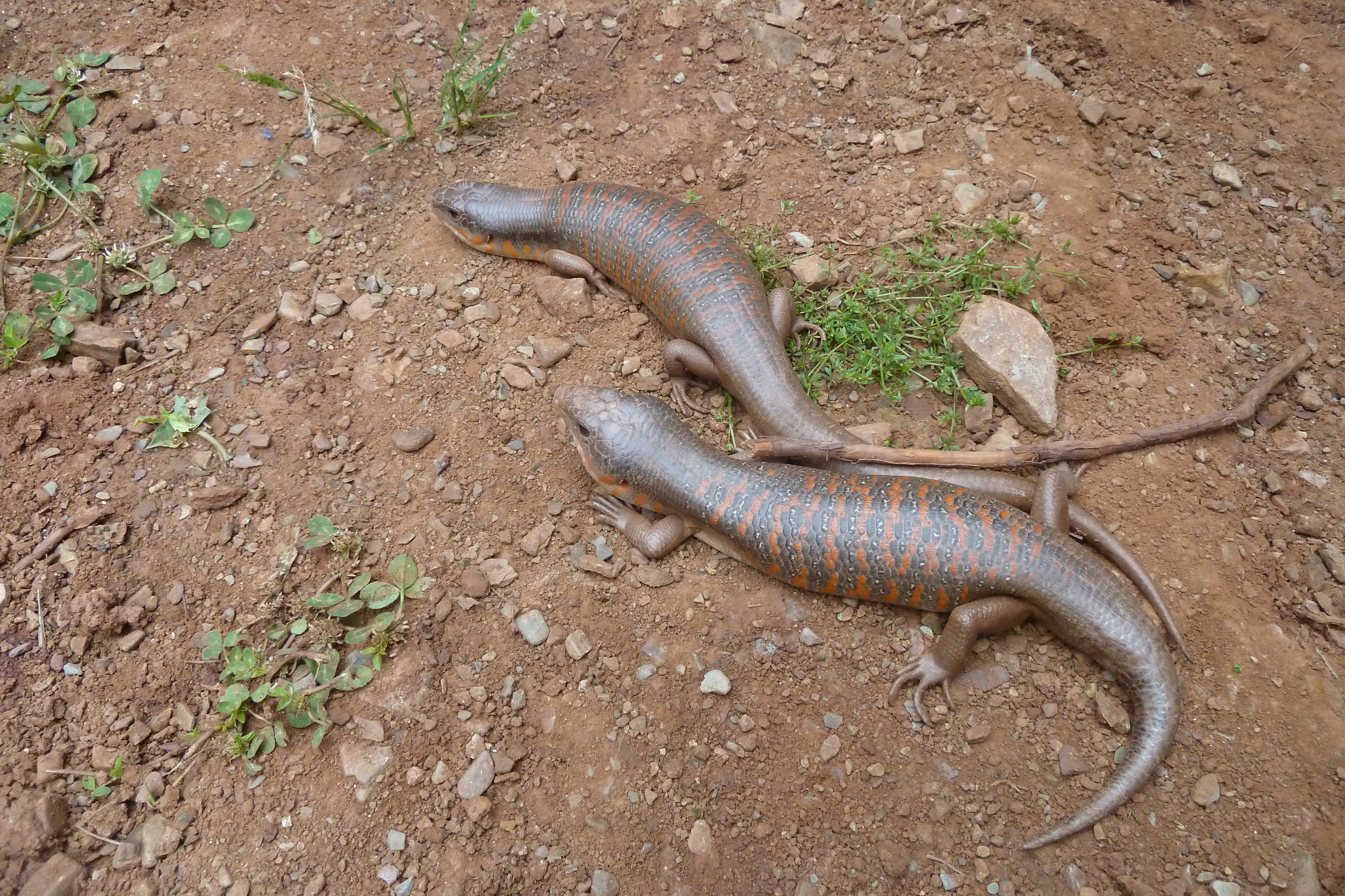 Site de Terres d'Amanar